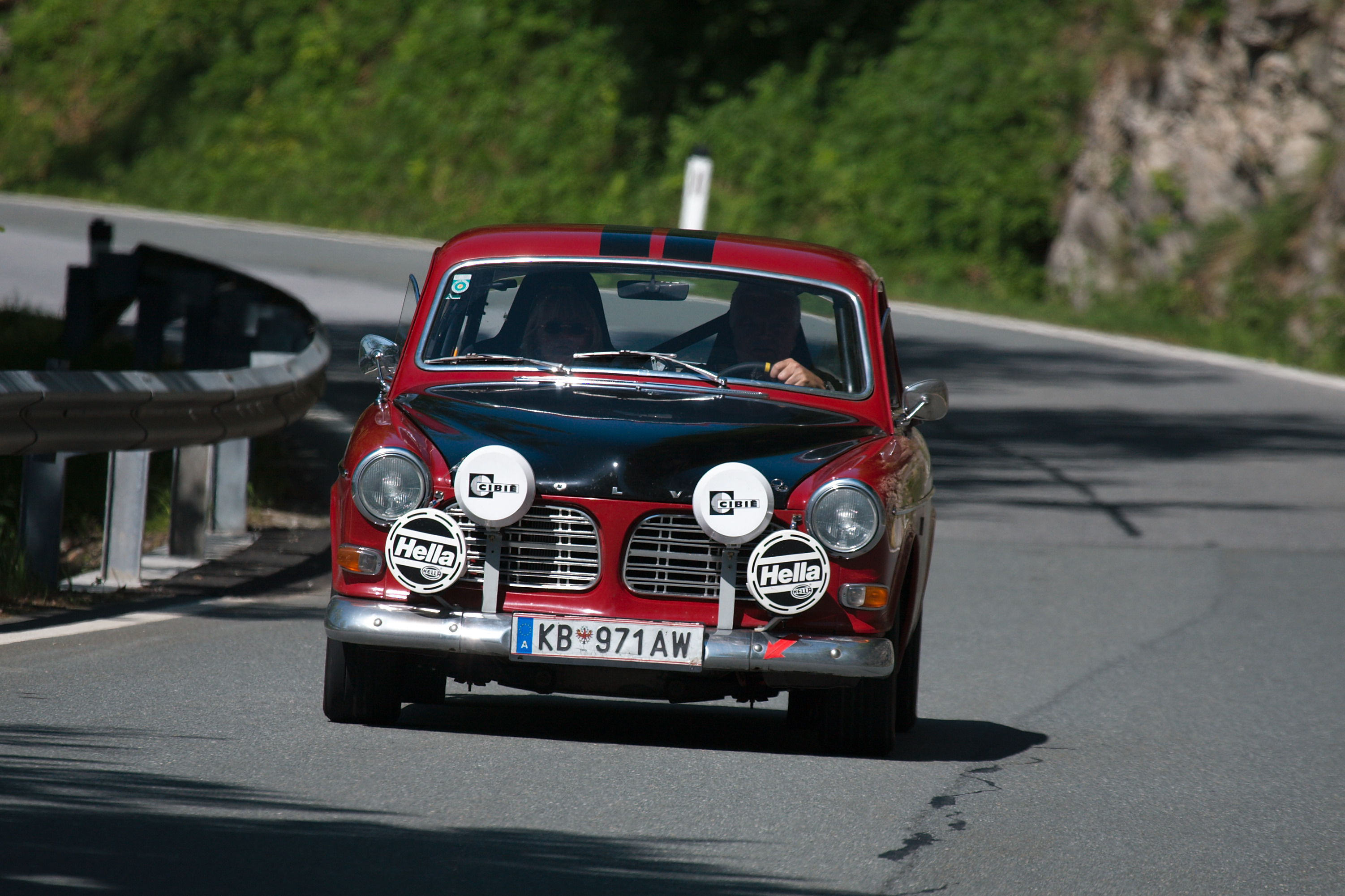 Volvo 122 S at Gaisbergrennen 2009